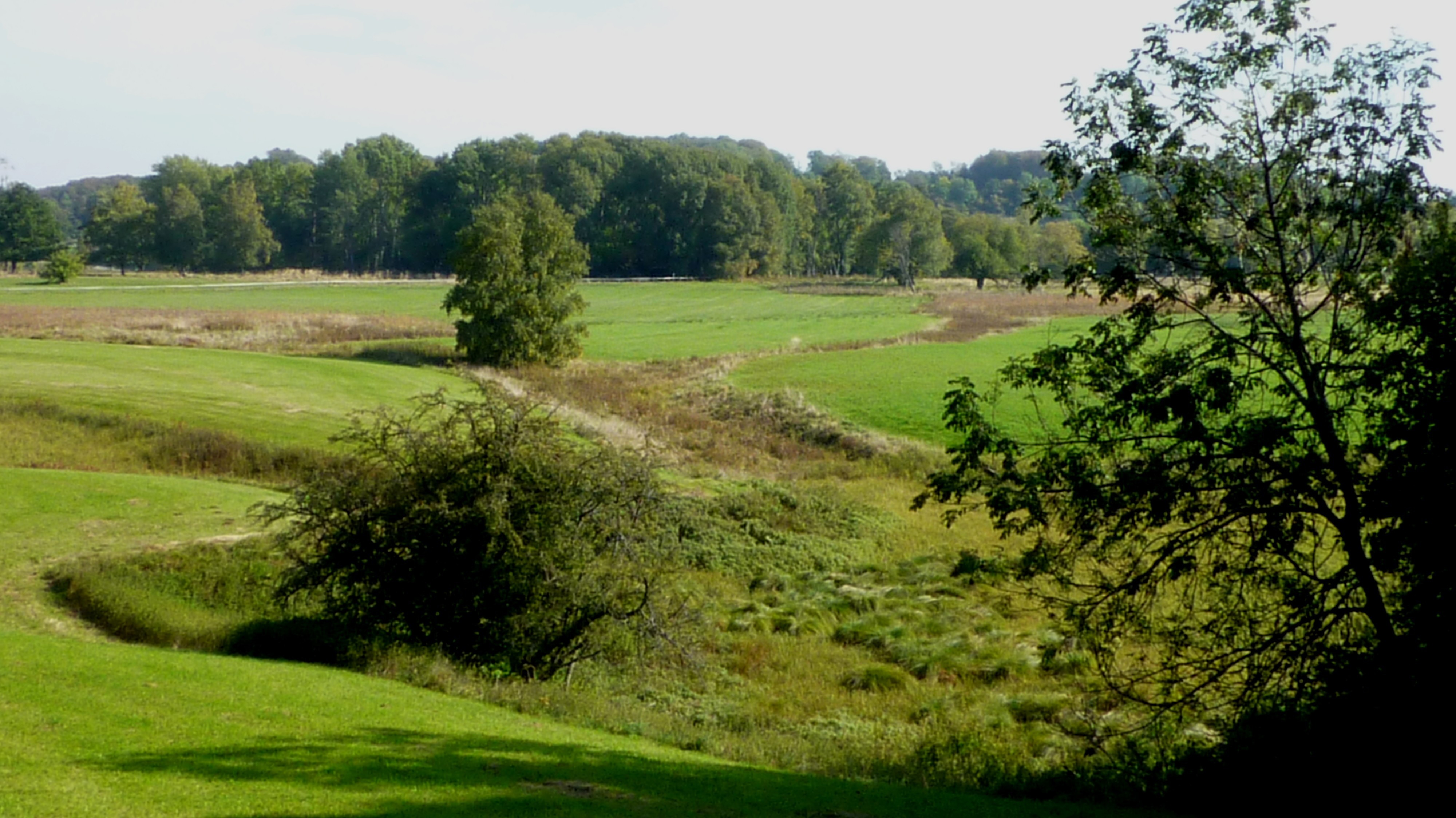 Naturschutzgebiet "Schopflocher Moor, (Torfgrube)", einziges Hochmoor der Schwäbischen Alb. Dies ist ein außerordentlich bedeutsames Geotop und Naturschutzgebiet. Das Feuchtgebiet entstand im Pleistozän, weil sich im Untergrund wasserstauender basaltischer Tuff eines schon im Ober-Miozän erloschenen Vulkans des Typs "Schwäbischer Vulkan" ("Urach-Kirchheimer Vulkangebiet") befindet. Am Rand des Schlotbereichs, am Übergang zu Schichten des Weißen Jura versickert das abfließende Wasser in tiefen Dolinen. Das Wasser tritt in Karstquellen im Tal der Lenninger Lauter wieder zu Tage.